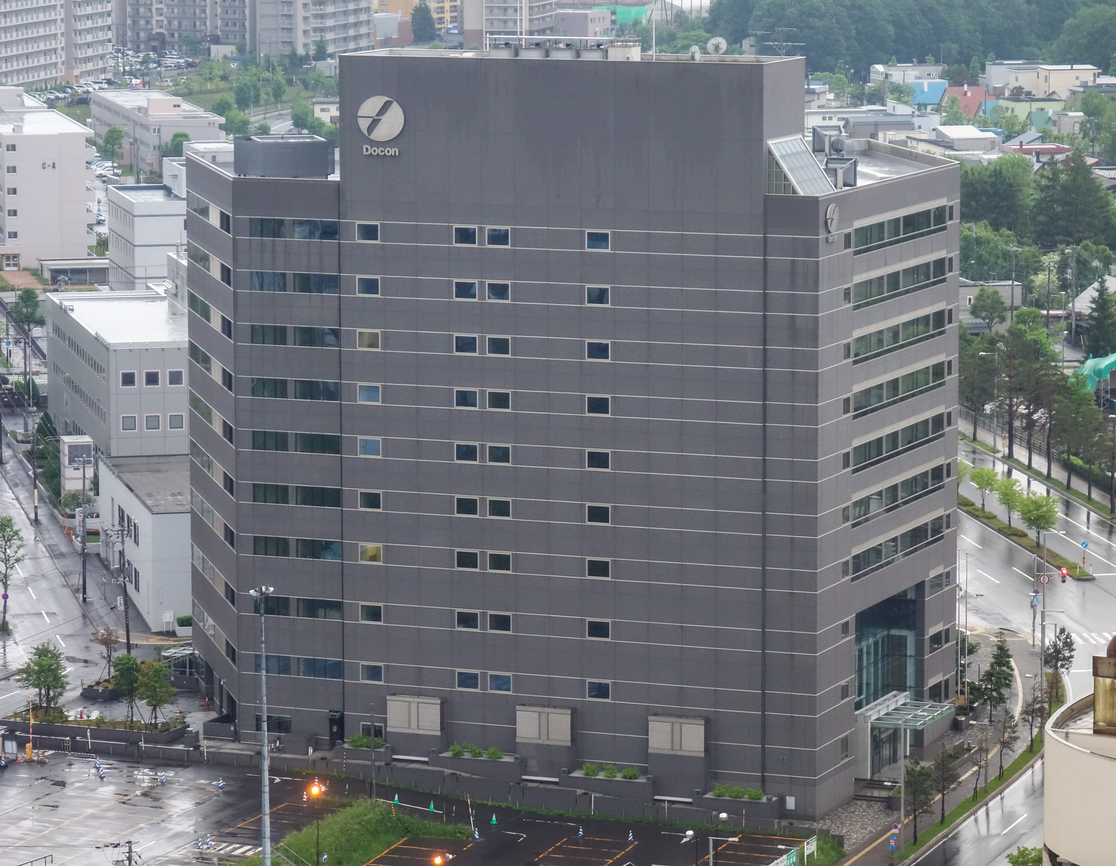 株式会社ドーコン本社 （札幌市厚別区）